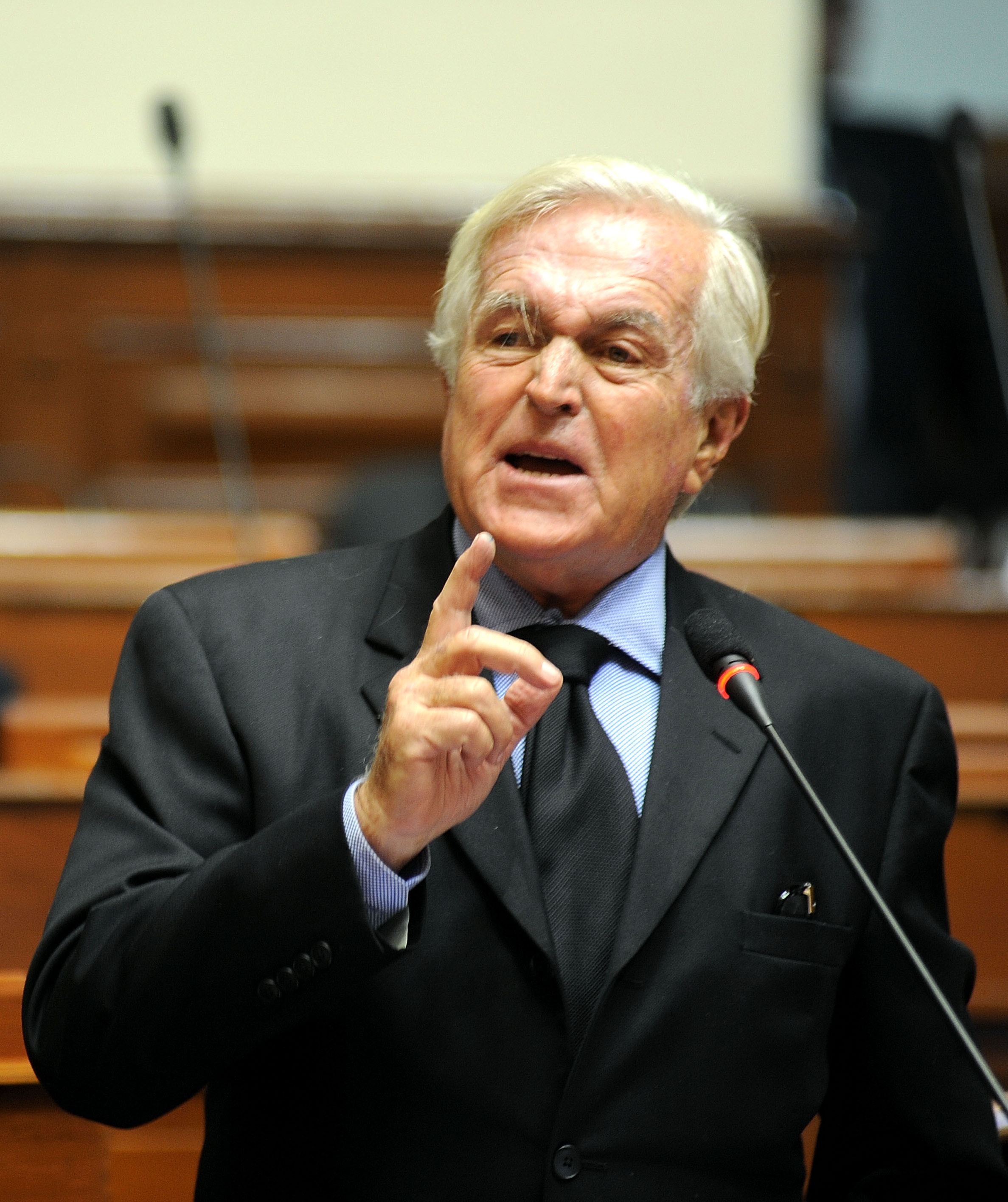 El legislador Javier Valle Riestra fija su posición en el debate parlamentario realizado esta tarde por el Pleno.